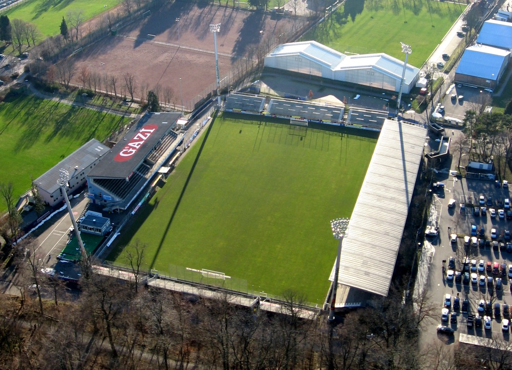 Waldaustadion in Stuttgart-Degerloch, Ansicht vom Fernsehturm (2006) eigenes Foto / alle Rechte freigegeben